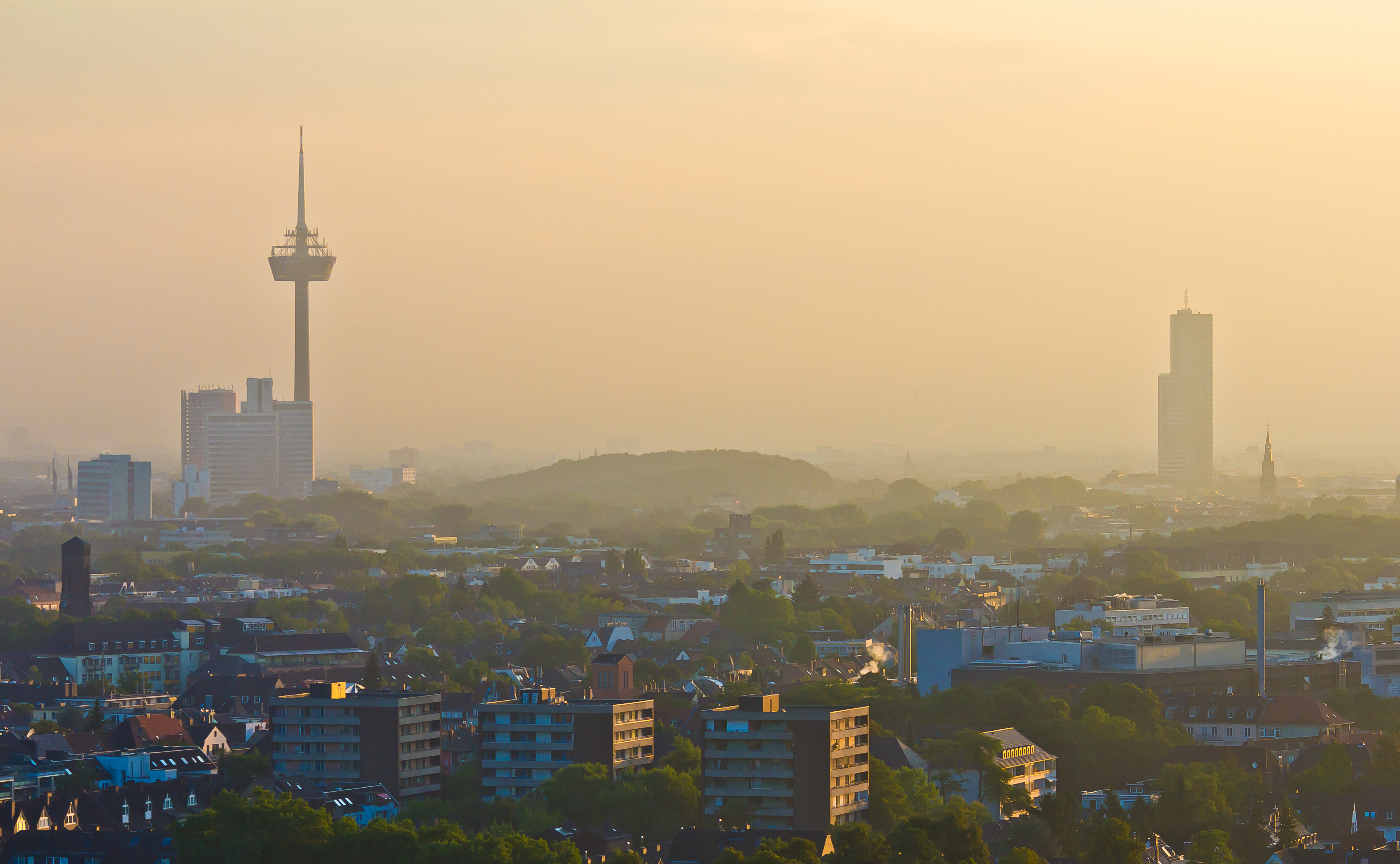 Ballonfahrt über Köln - Colonius, Herkulesberg und KölnTurm